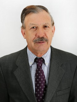 Felipe Letelier Norambuena